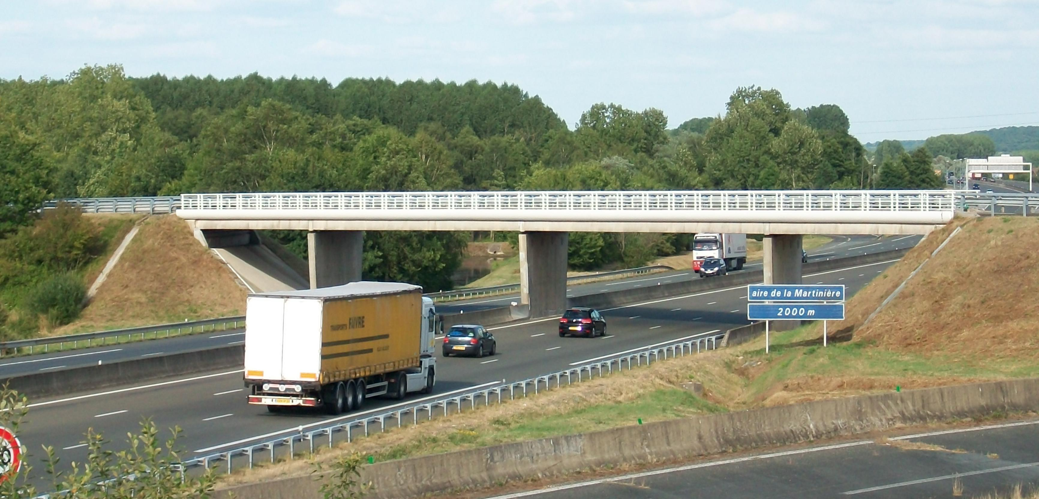 Vue de l'A11 à l'est du Mans, non loin de Parence, commune d'Yvré l'évêque.